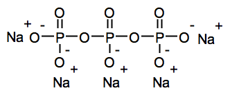 Натрій-3-фосфат